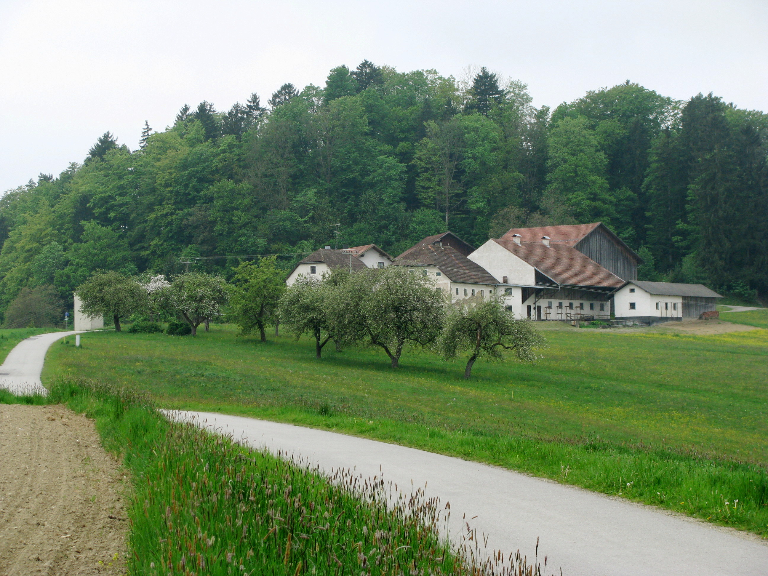 Der Ort Kaltenstein im Markt Röhrnbach von Osten mit dem Burghügel der Burg Kaltenstein dahinter.